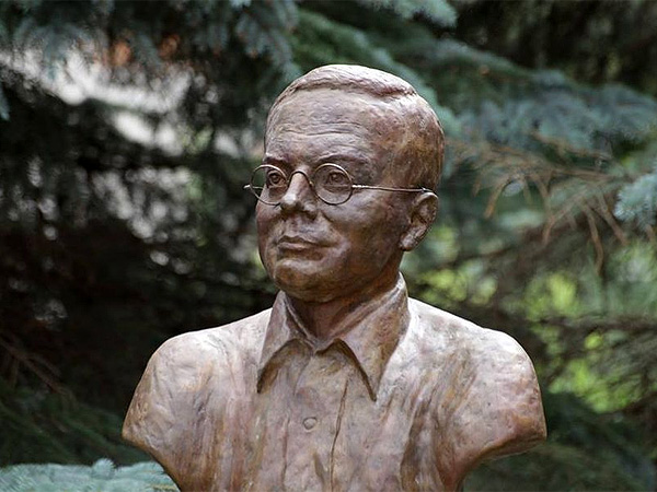 Памятник Н. А. Заболоцкому в Тарусе. Работа скульптора Александра Казачка. Июль 2015 года